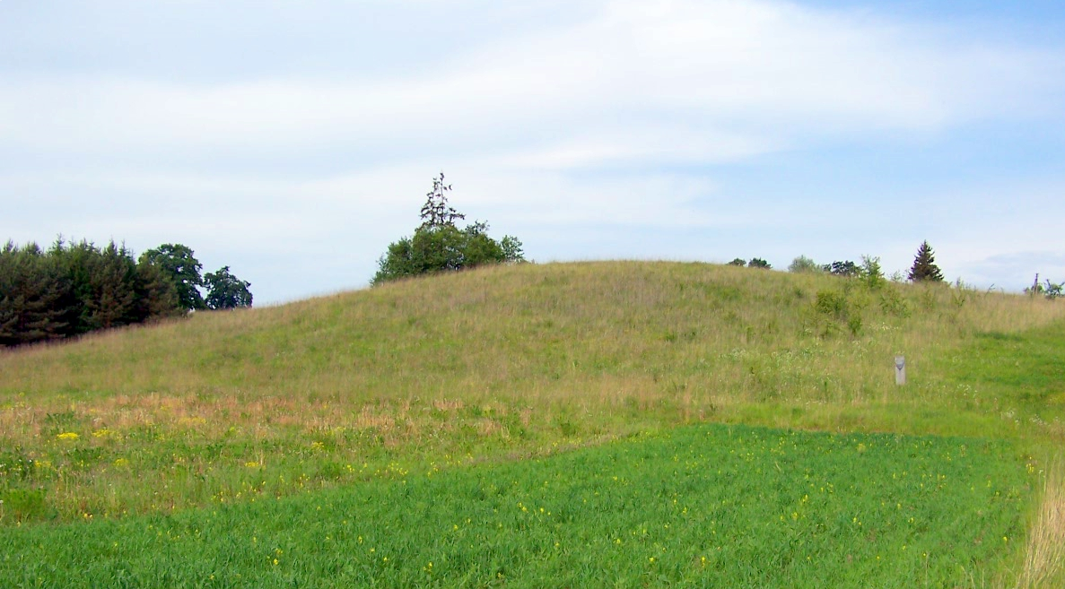 Buivėnų kapinynas